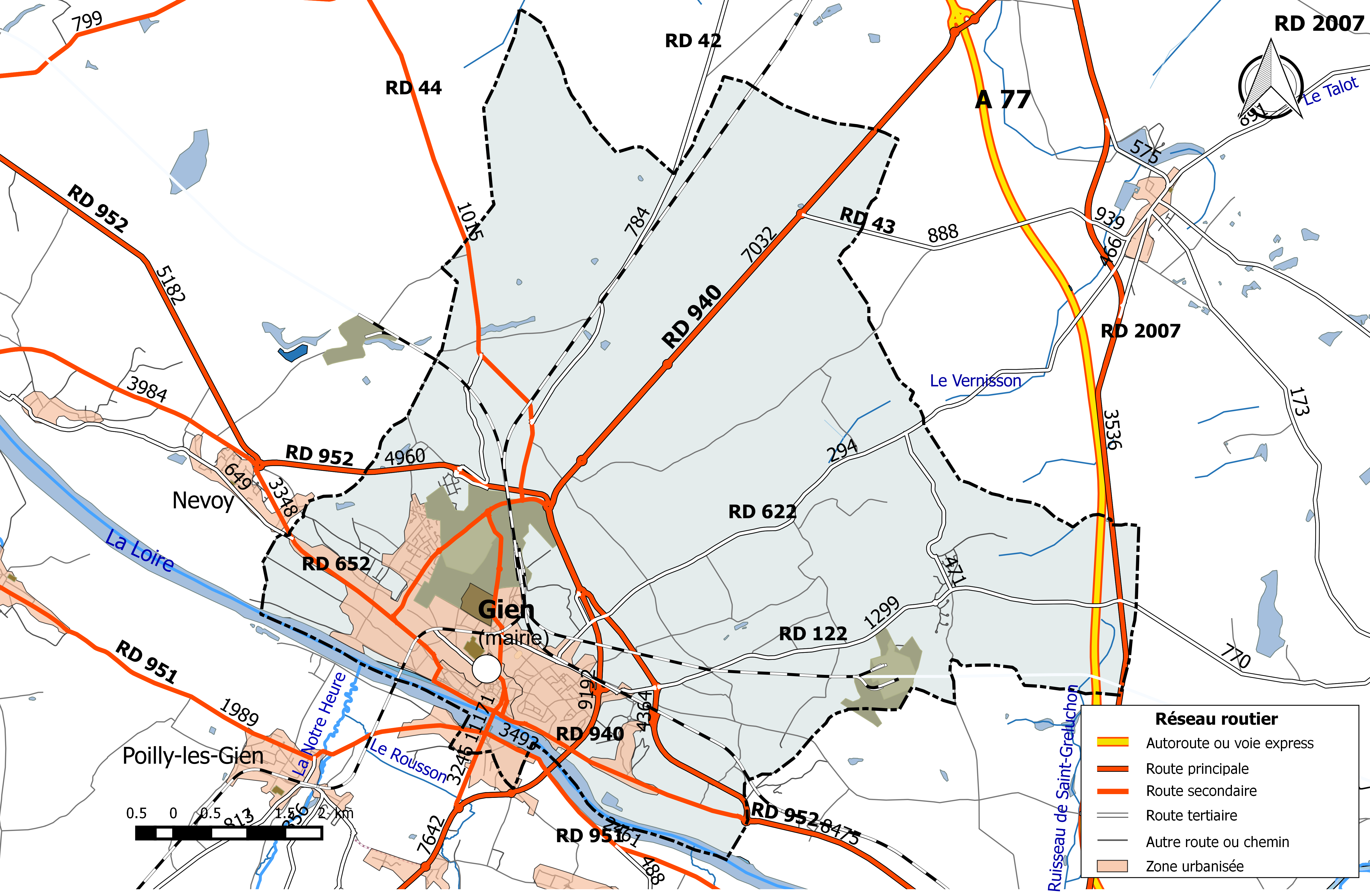 Carte du réseau routier de la commune de Gien.